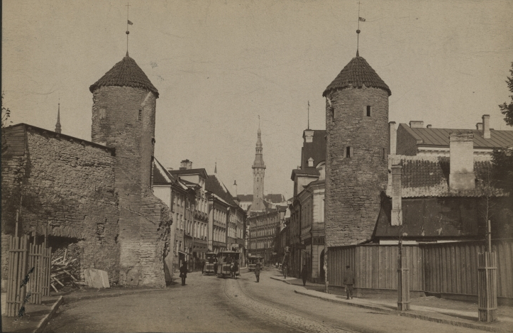 Viru värav hoburaudtee ehitamise ajal 1888. aastal